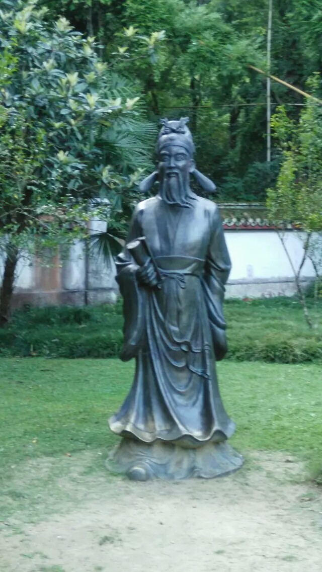 中文（中国大陆）: 柳永造像，保存于武夷山国家风景名胜区柳永纪念馆（武夷山市）。武夷山市地方志管理办公室立。铜质，儒生样貌，手持“书本”标为《巫山一段云》